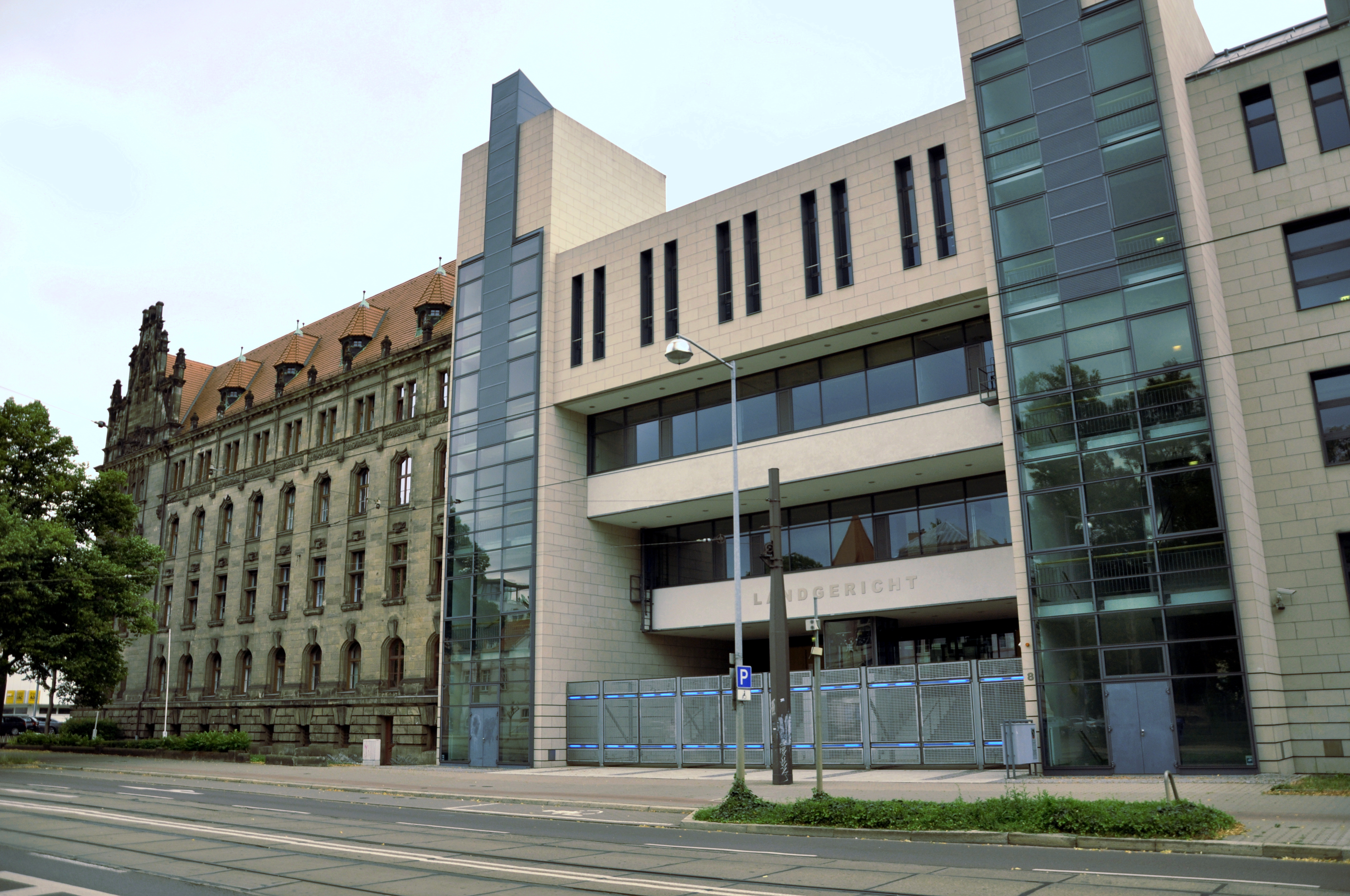 Landbericht Magdeburg